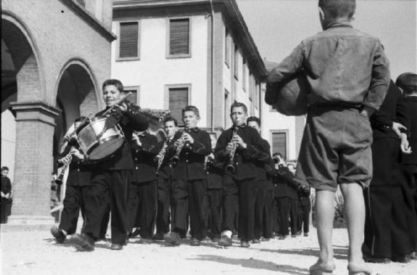 Italia Dopoguerra. Milano - Banda dei Martinitt - Bambini in divisa - Strumenti musicali